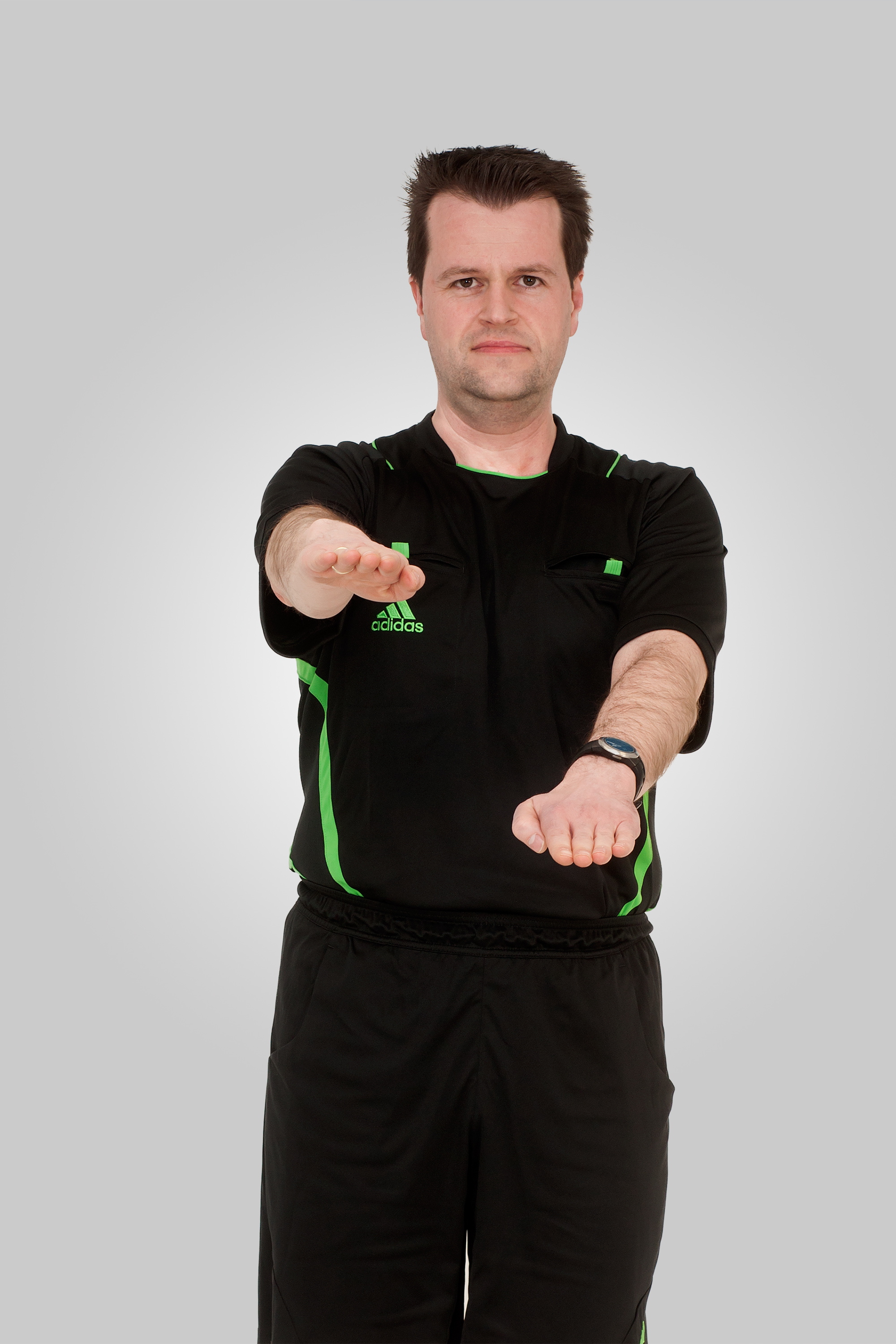 Internationale Handballregeln Handzeichen 02 Prell- oder Tippfehler